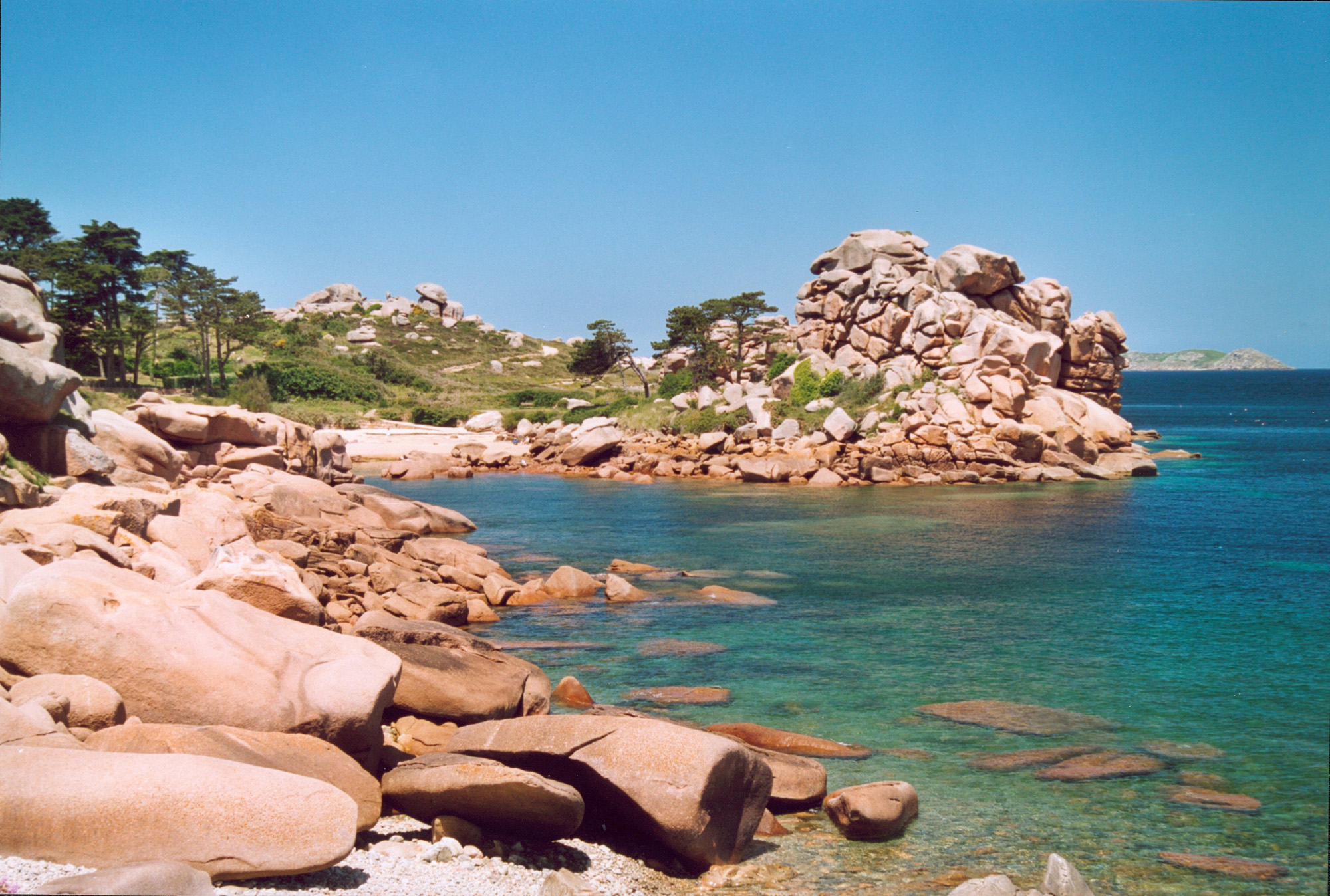 Bretagne la côte de granit rose Auteur : GIRAUD Patrick